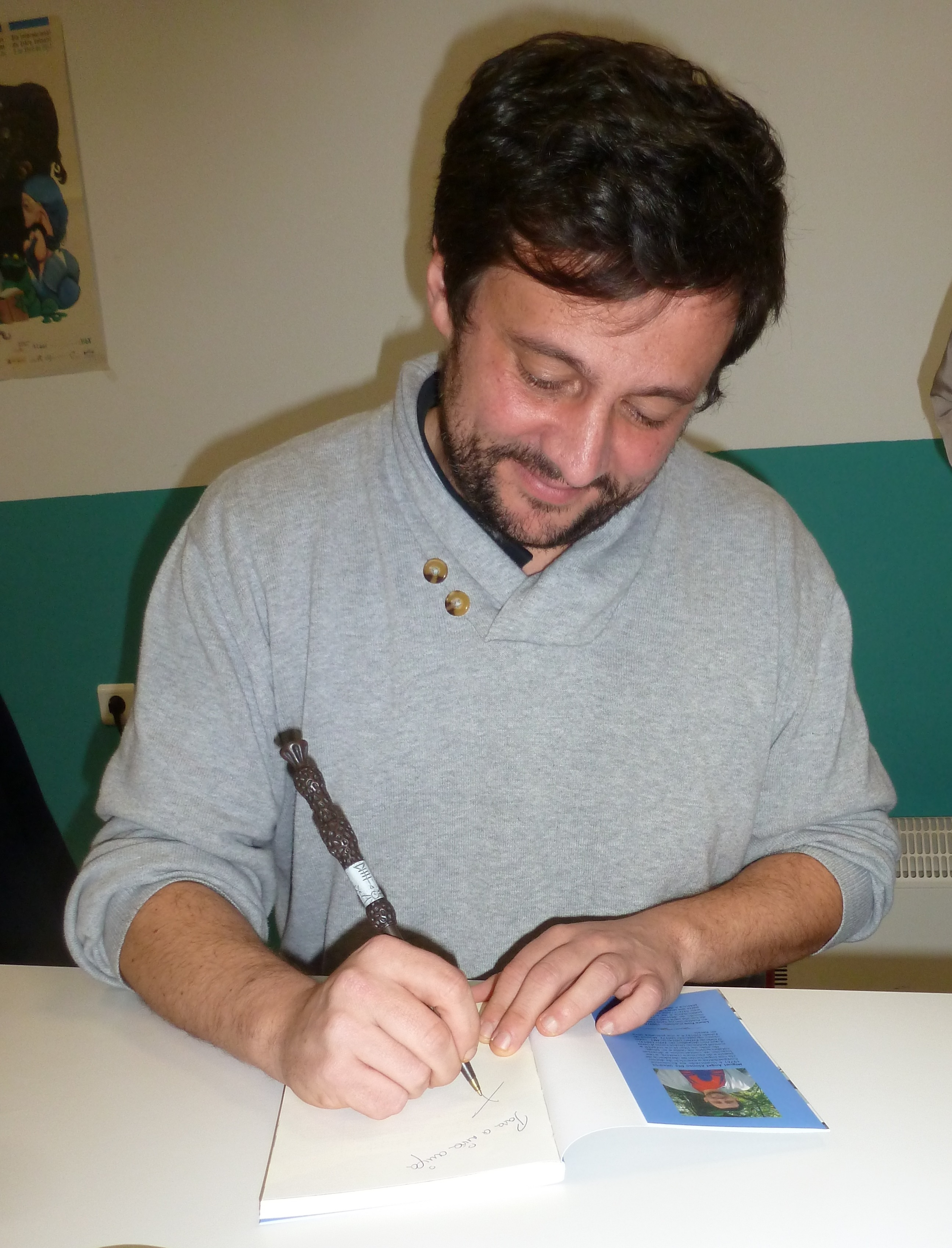 Miguel Ángel Alonso Diz asinando "Música no faiado" na presentación na Biblioteca Torrente Ballester de Bueu